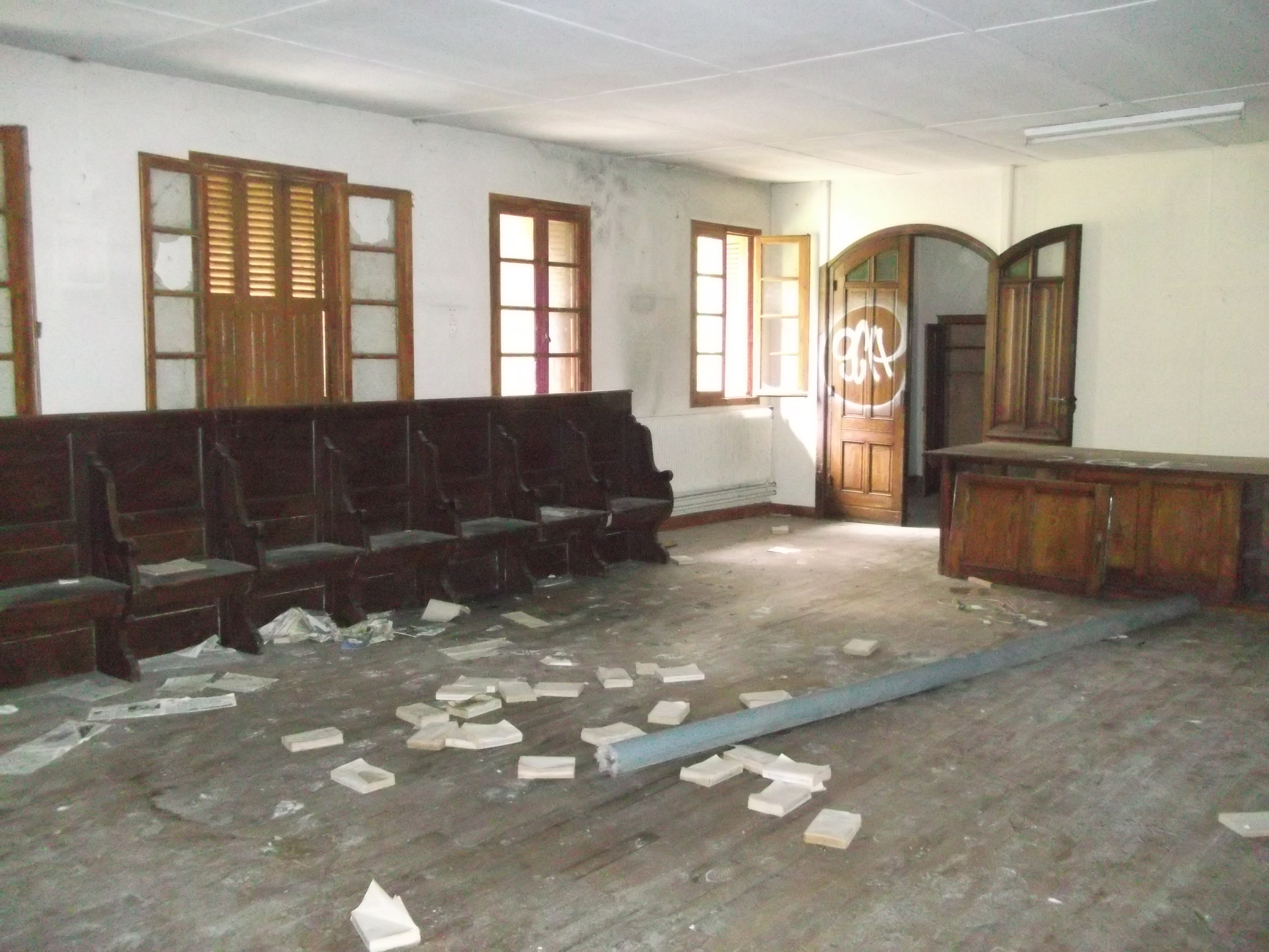 Salle de prière des ruines du Couvent de la Visitation de Vif, Isère